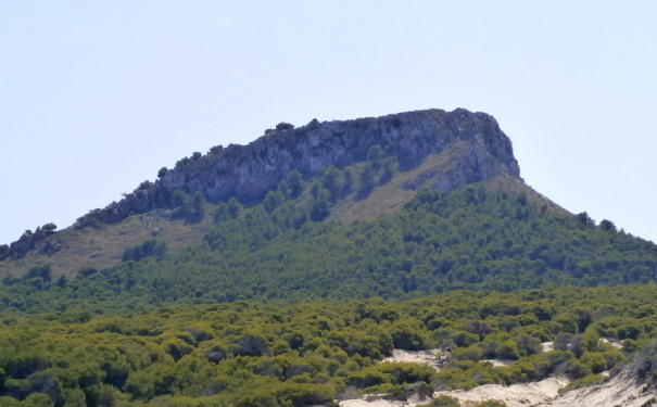 Puig de s Aguila